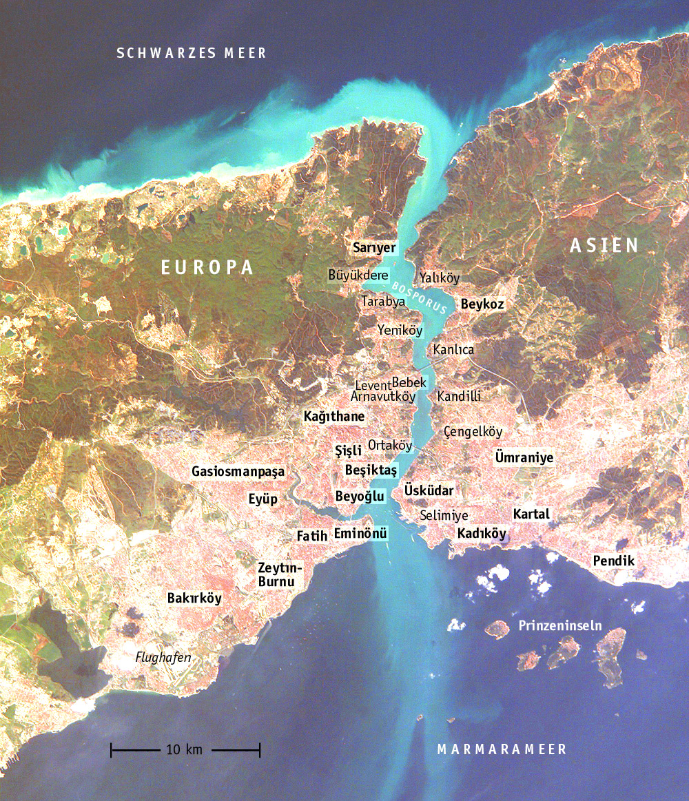 Stadtteile Istanbuls.